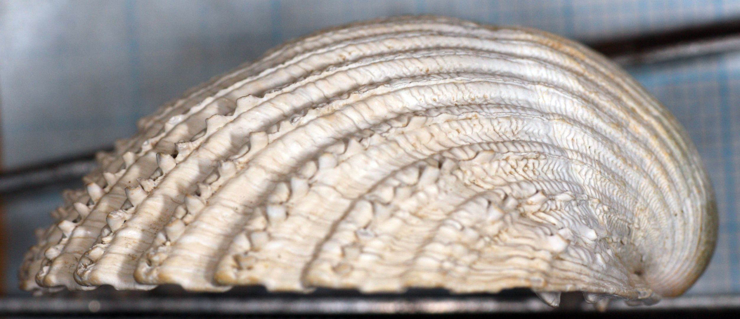 Pigghjerteskjell Acanthocardia echinata